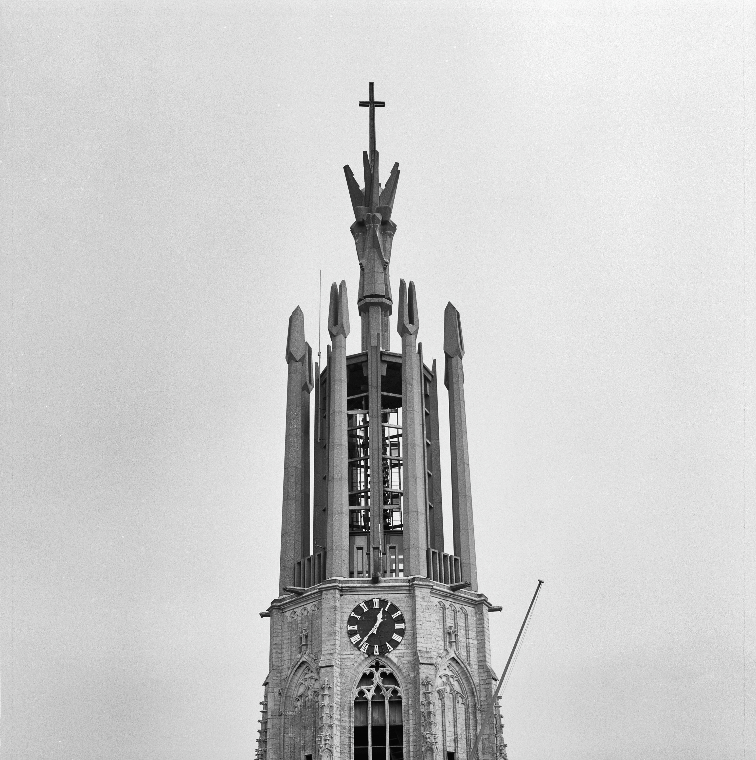 Sint Willibrorduskerk: Exterieur VIERINGTOREN, DERDE GELEDING